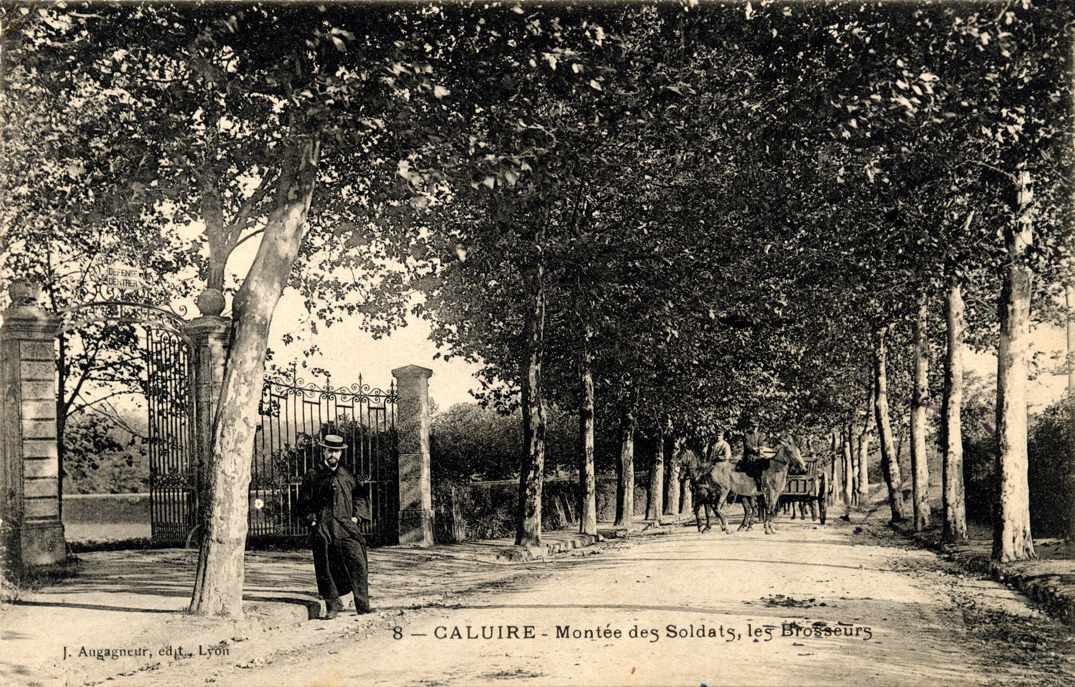 La montée des soldats de Caluire vue d'en haut, avec le portail du domaine des Brosses sur la gauche.